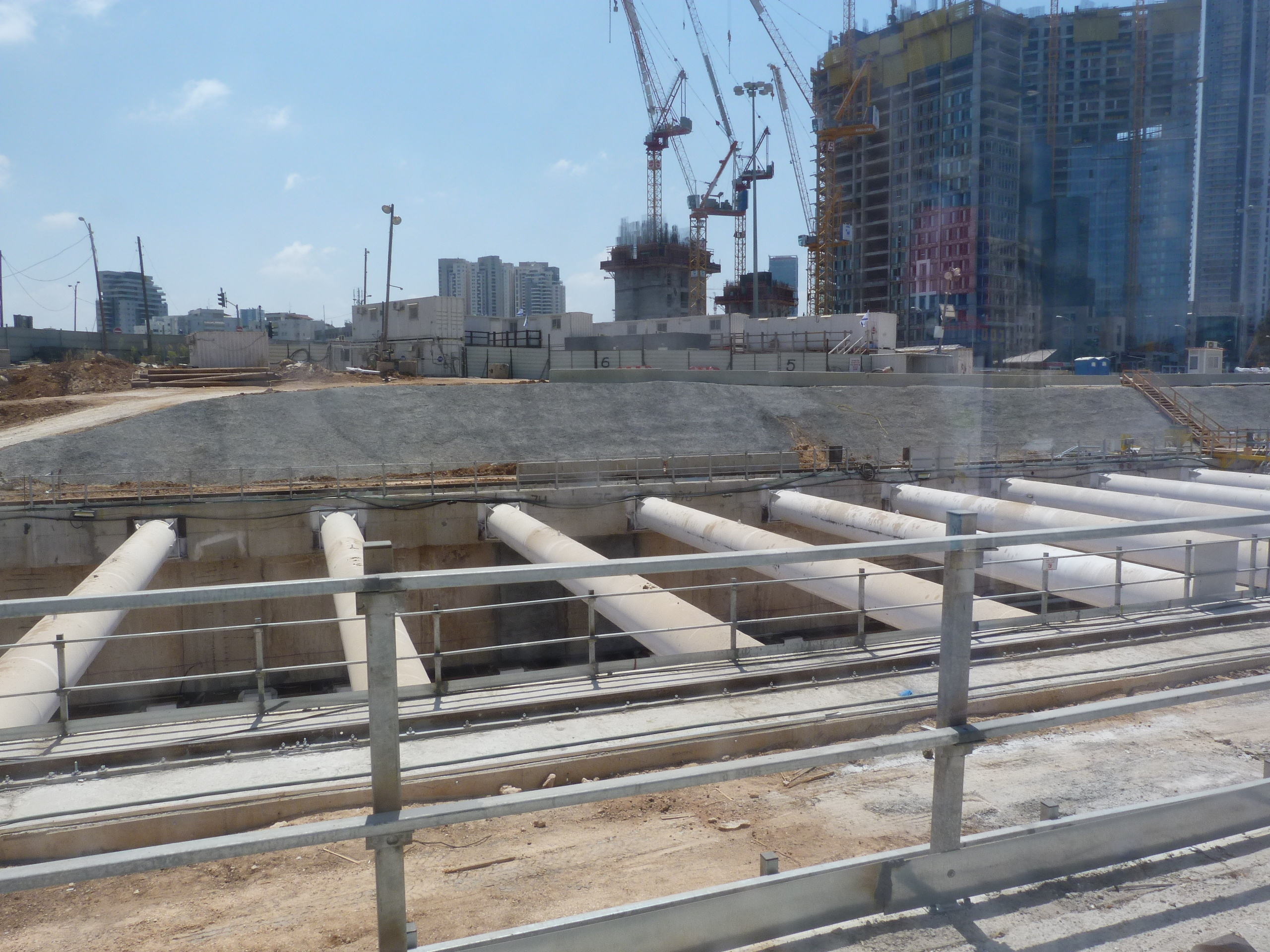 תצלום של העבודות לבניית תחנת הרכבת הקלה התת-קרקעית "ארלוזורוב", תל אביב.